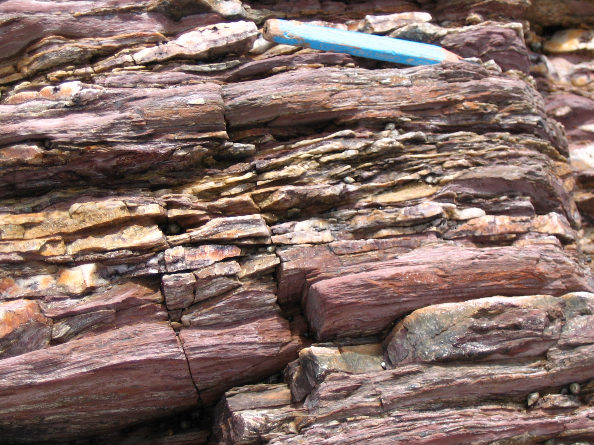 Estran de Brétignolles, Vendée, F. Schistes rouges, détail